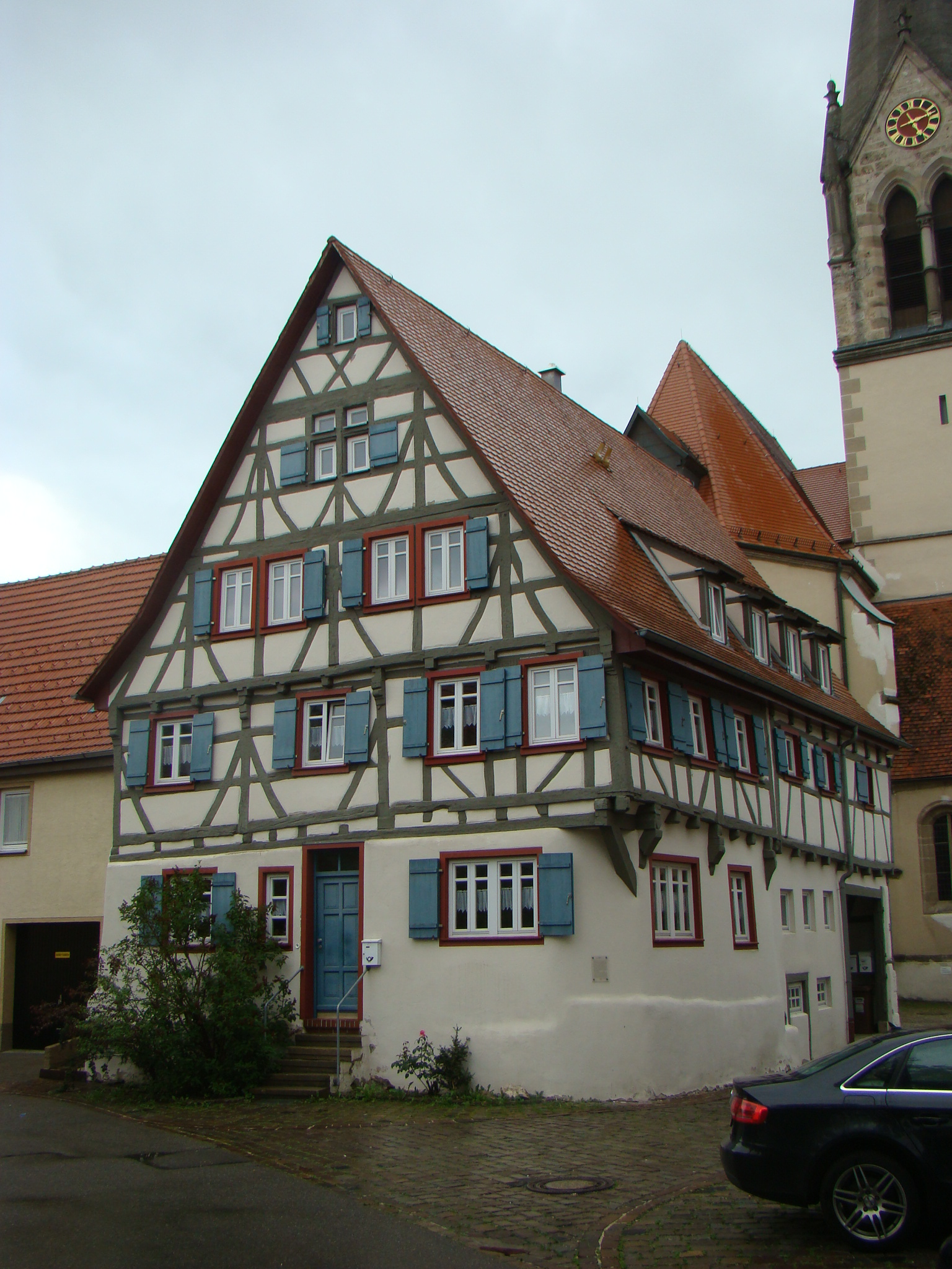 Münsingen